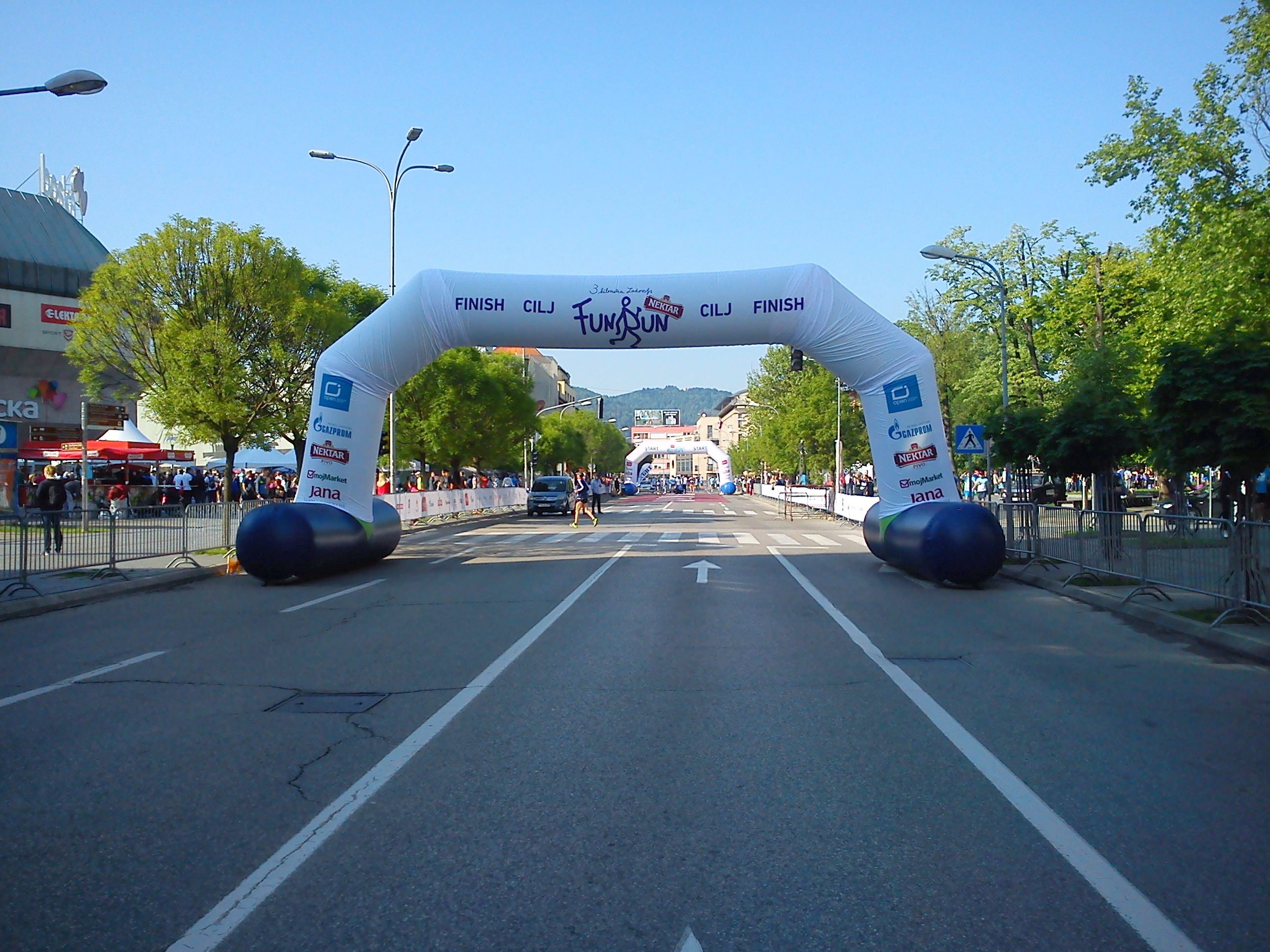 Start/cilj Banjalučkog polumaratona, na Trgu Krajine.